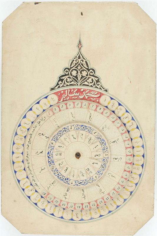 Kalender. Acehse kalender op karton Acèh: Teumpat kalon uroë buleuën